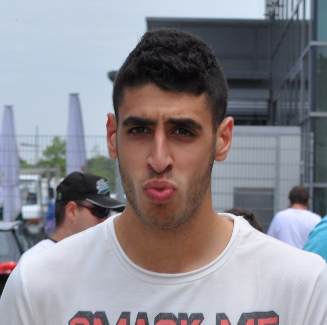 Tolga Ciğerci beim Training